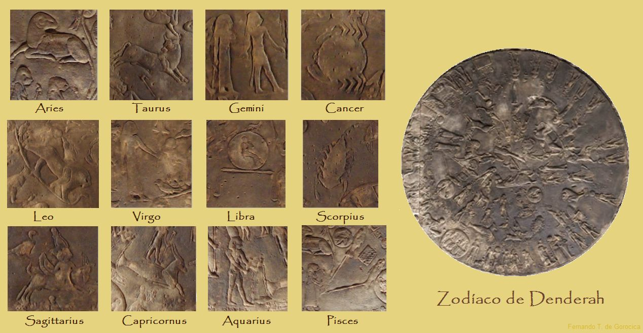 ZODÍACO DE DENDERA (36 a 30 a. C.). Zodíaco ubicado en el techo de la cámara dedicada a la deidad egipcia Osiris. Templo de Hator, Dendera, a unos 70 km al norte de Luxor, Egipto. Actualmente en el museo del Louvre, Paris (sólo el Zodíaco de 2,53 x 2,55 mts).